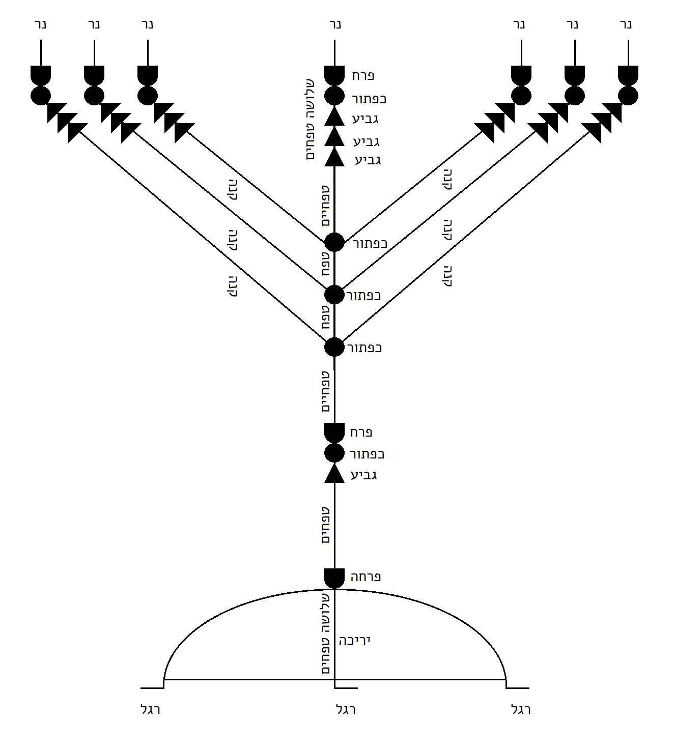 תרשים המנורה ע"פ הרמב"ם